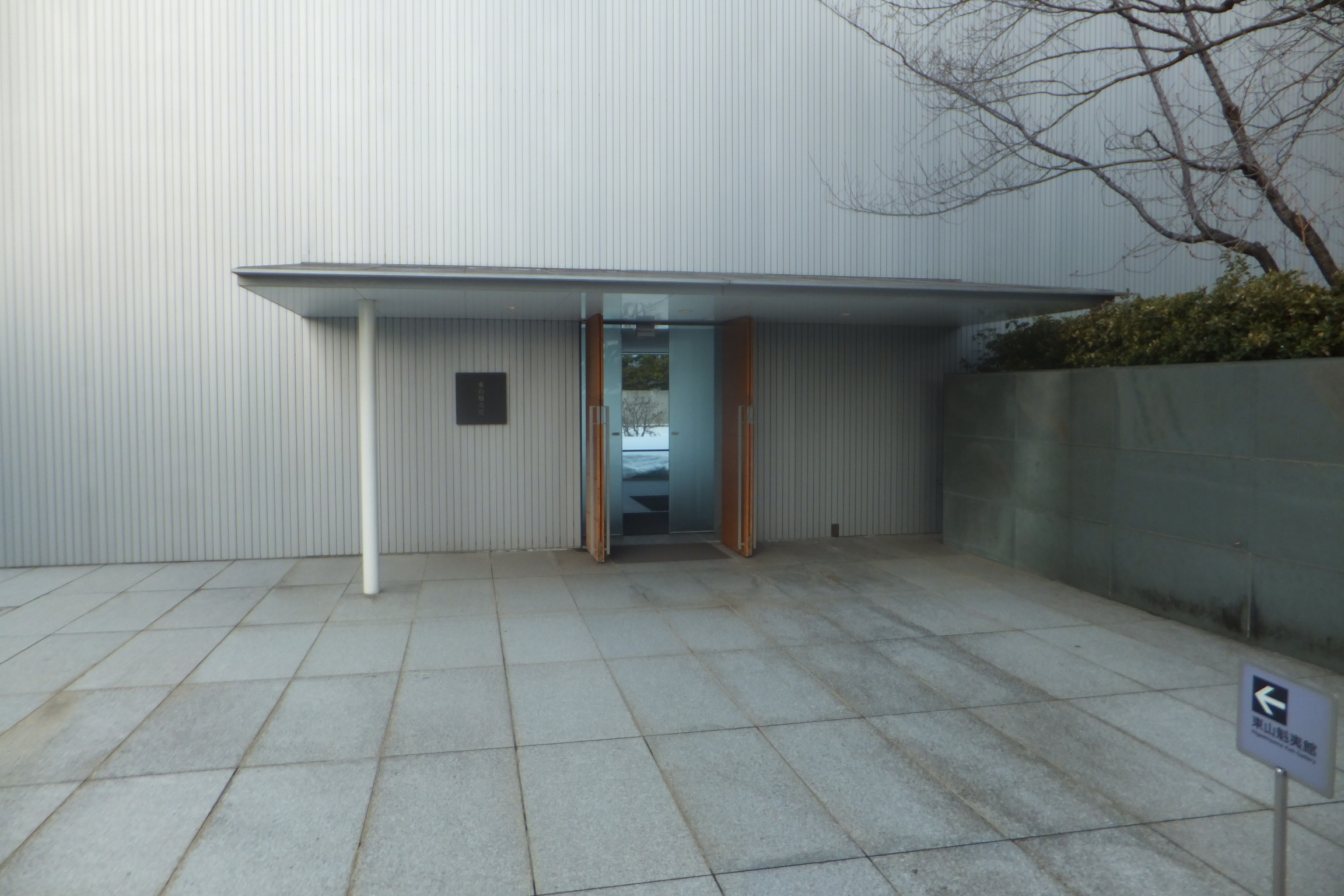 長野県信濃美術館・東山魁夷館